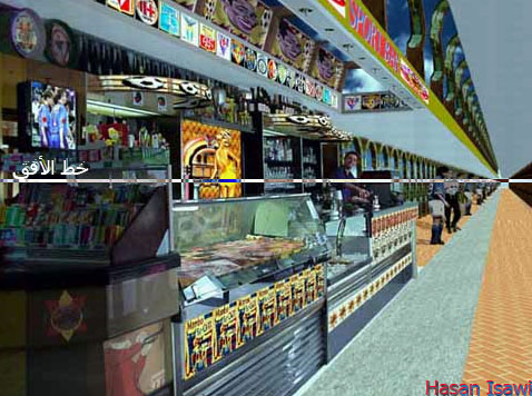 خط الأفق, linea dell`orizzonte (sport bar), Horizon